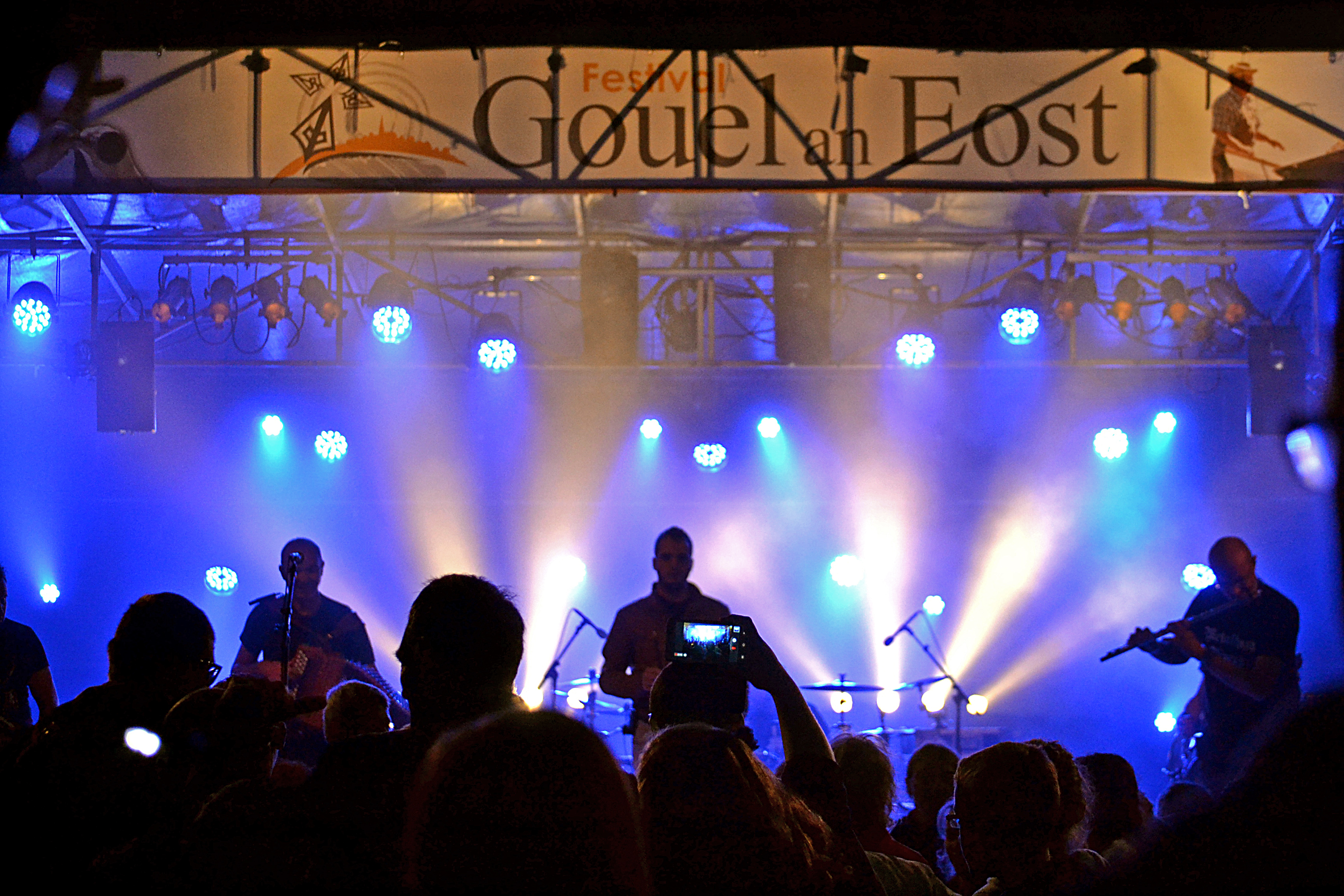 Digresk en concert au festival Gouel an Eost à Plougoulm (Finistère) le 9 août 2015.